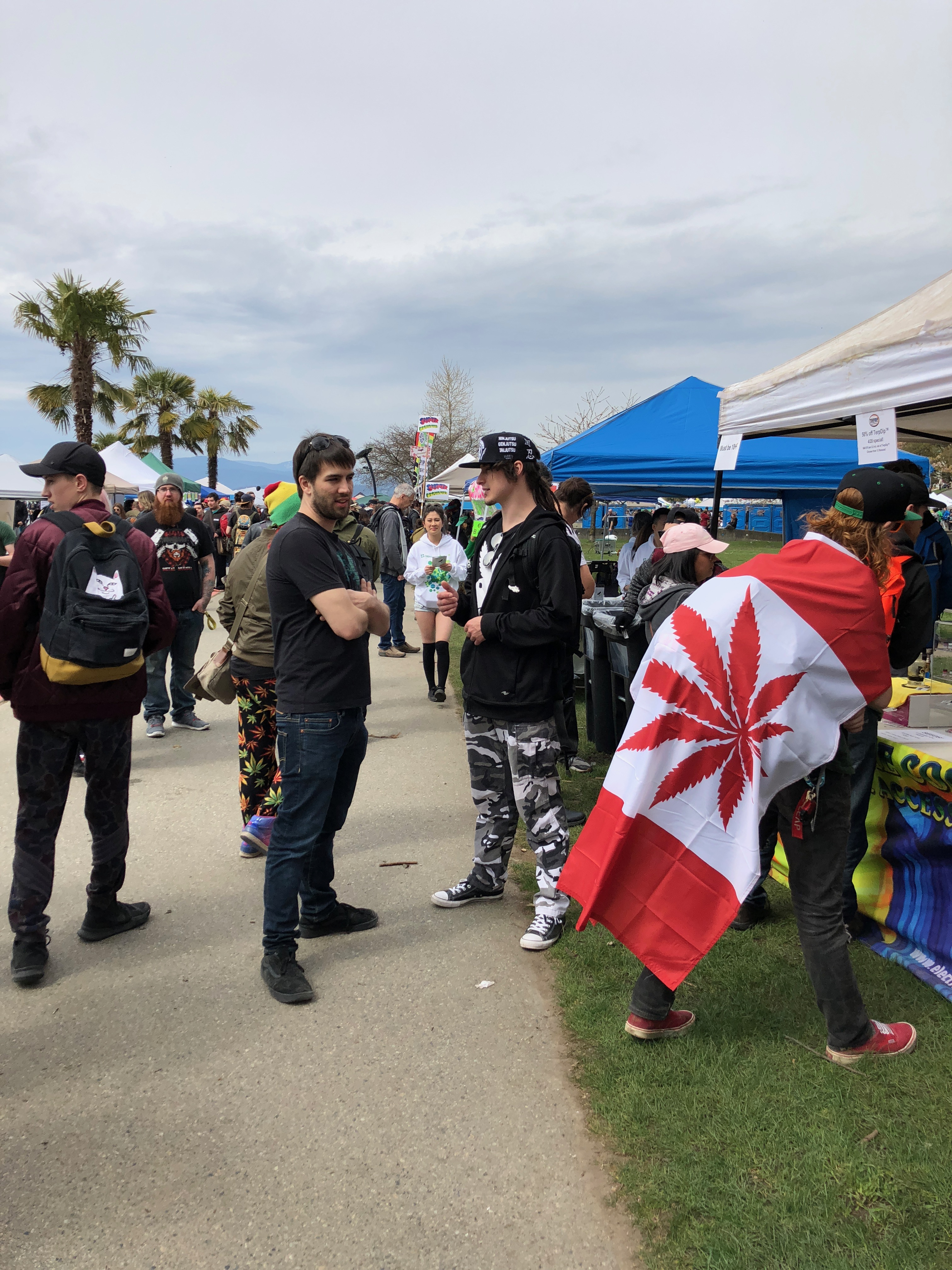 Canadians enjoying browsing freely and celebrating their love of Marijuana/Cannabis.